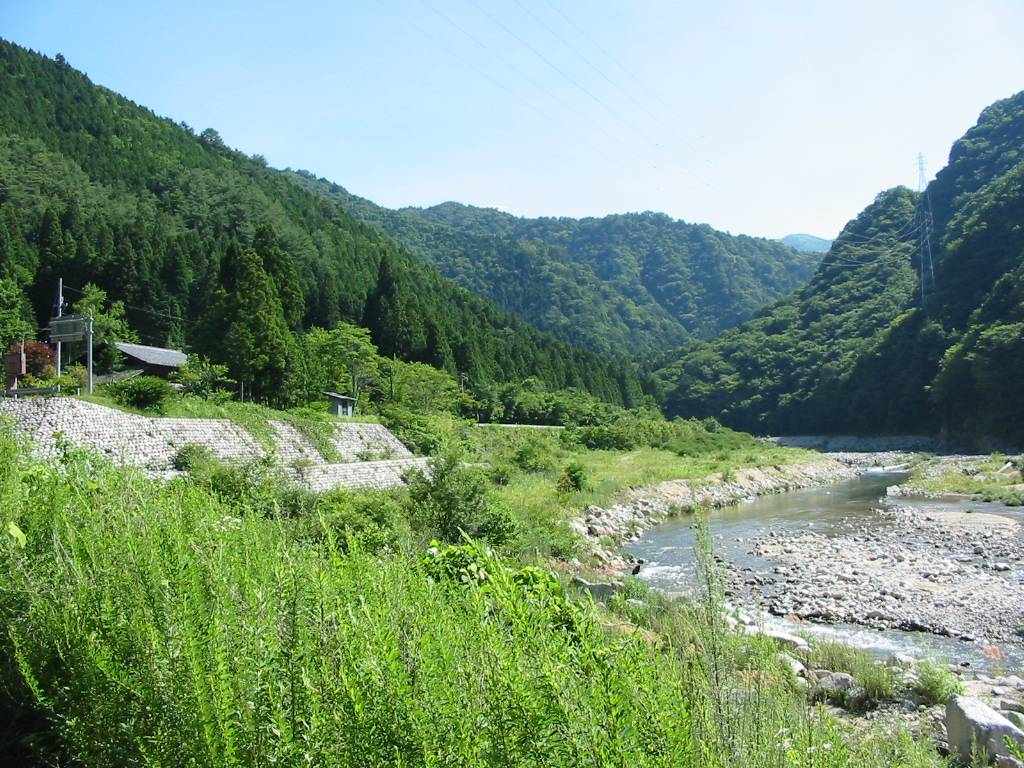 岐阜県恵那市海